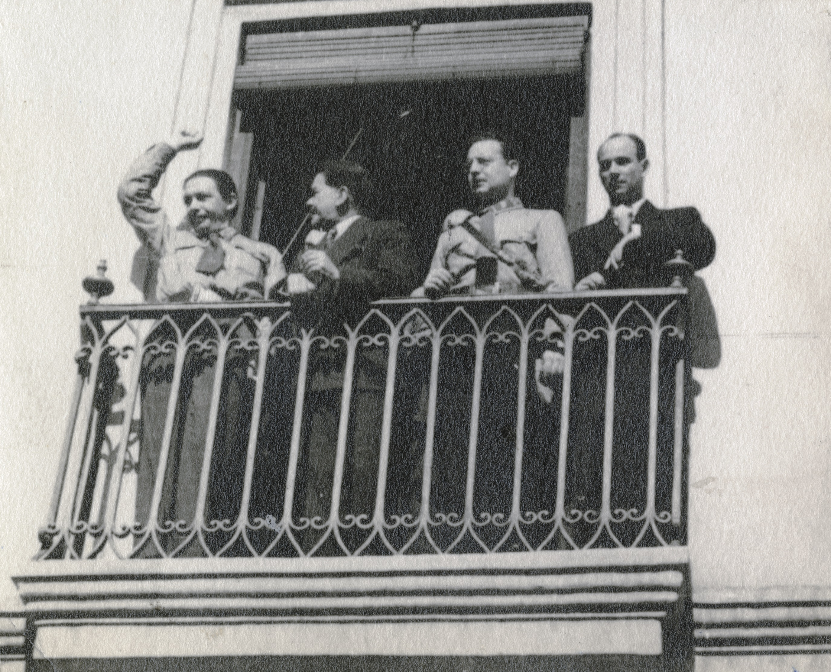 1939. Presidente Aguirre Cerda, en el balcón de La Moneda, junto a Salvador Allende, Oscar Schnake, y otro hombre n/i.